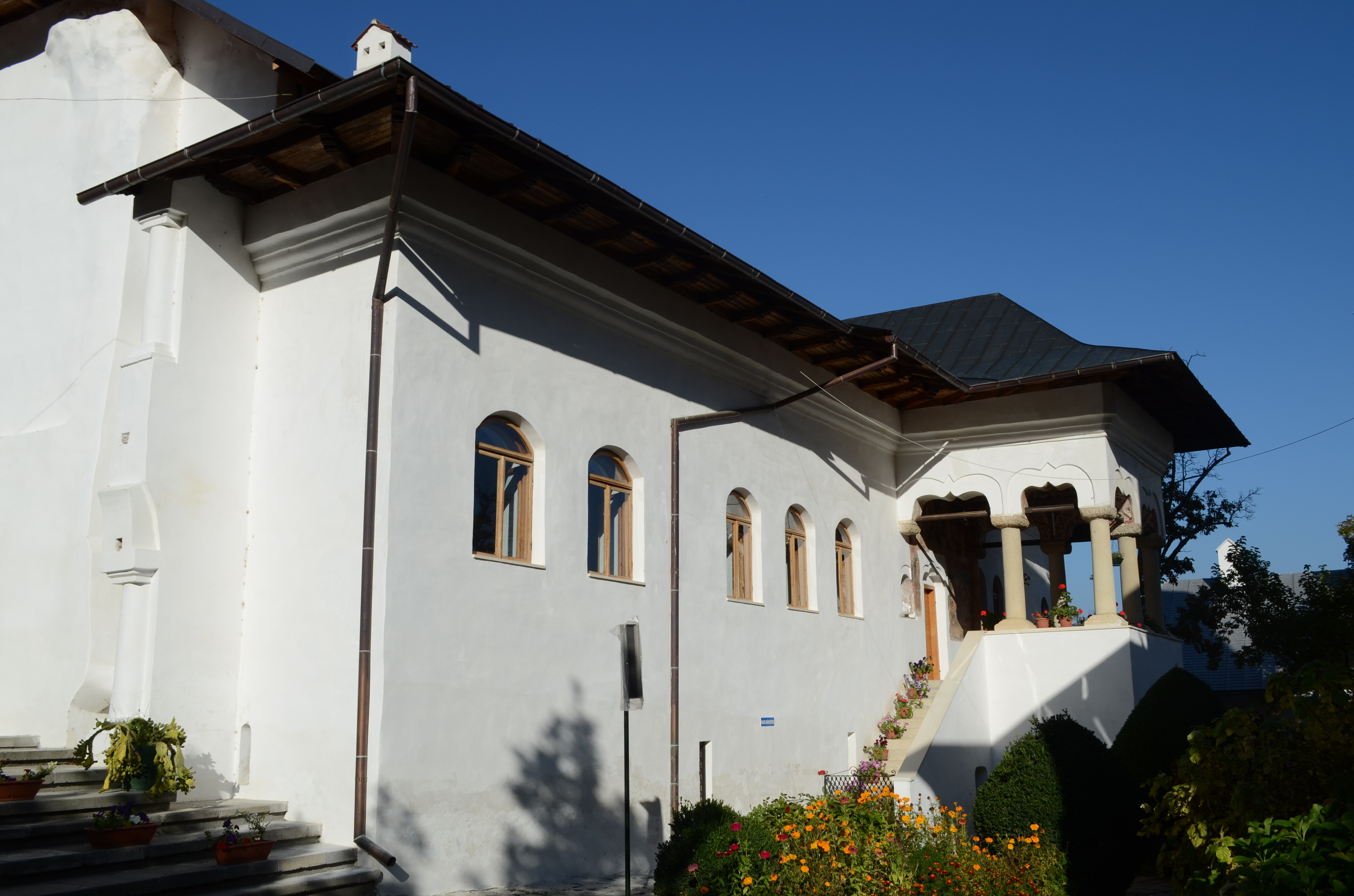 Stăreția (Palatul Brâncovenesc), Mănăstirea Dintr-un Lemn, județul Vâlcea 03